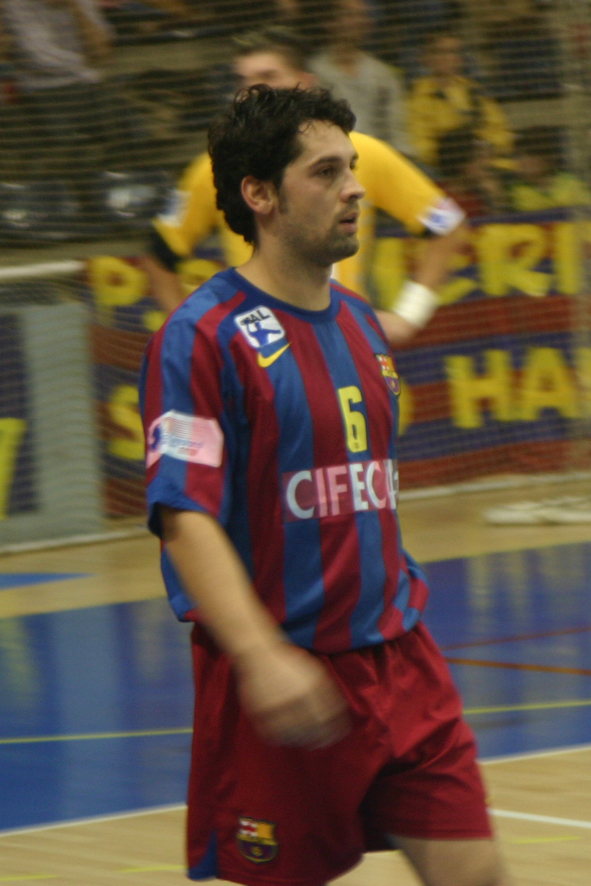 Juan García Lorenzana Juanín, jugador d'handbol. Fotografia del dia 5 de novembre de 2005, en un partit de la Lliga Europea al Palau Blaugrana de Barcelona.